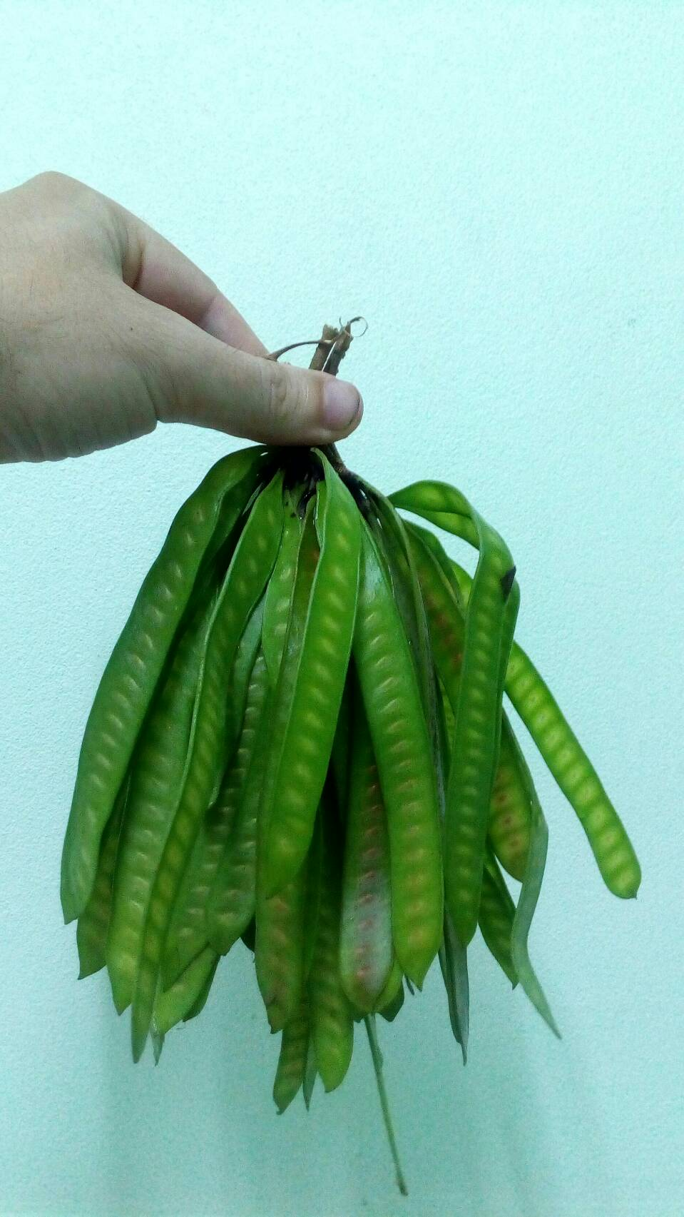 Пучок стручків левкени сизої з базару в Убон Рачатані.